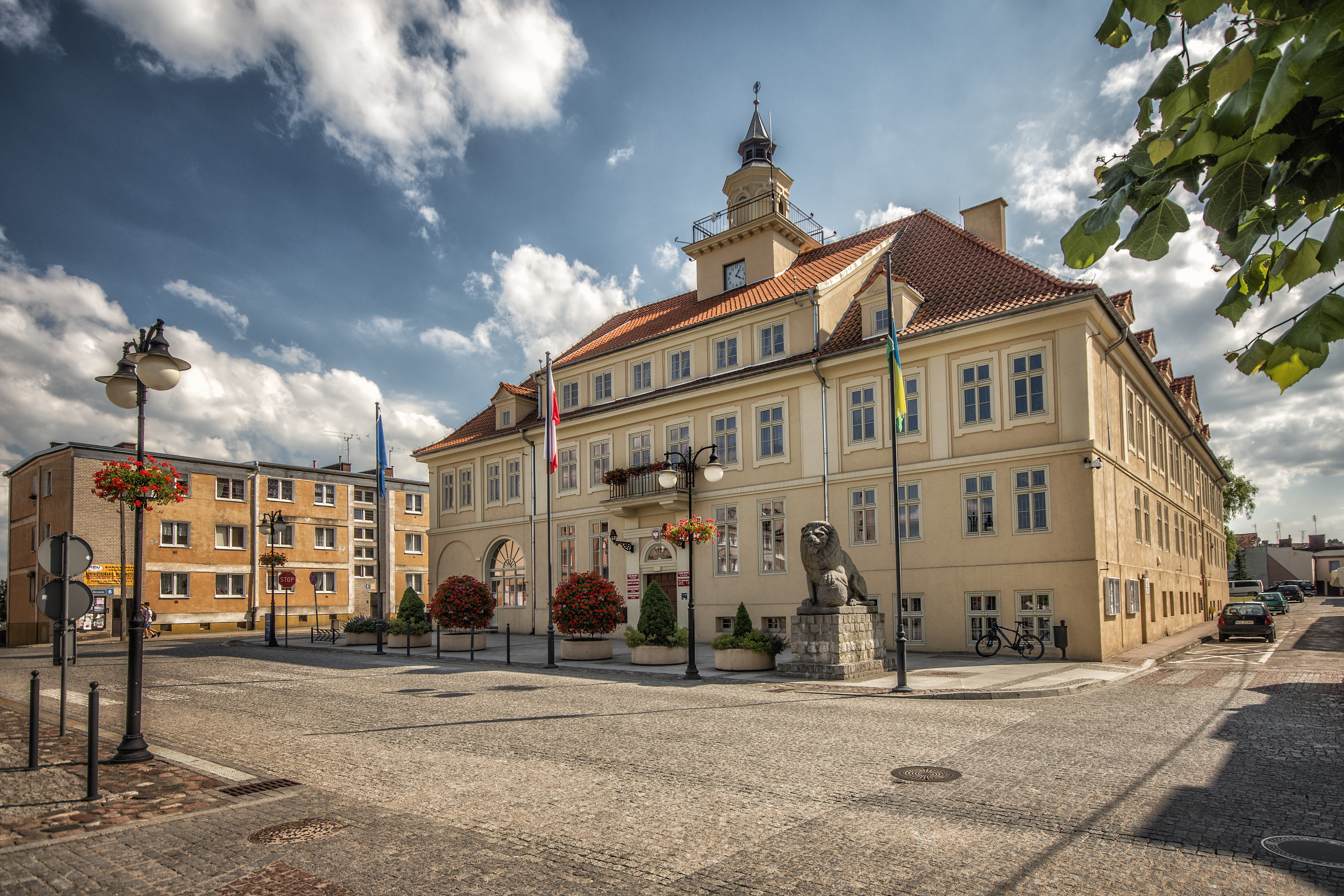 Olsztynek, ratusz, 1915-1923